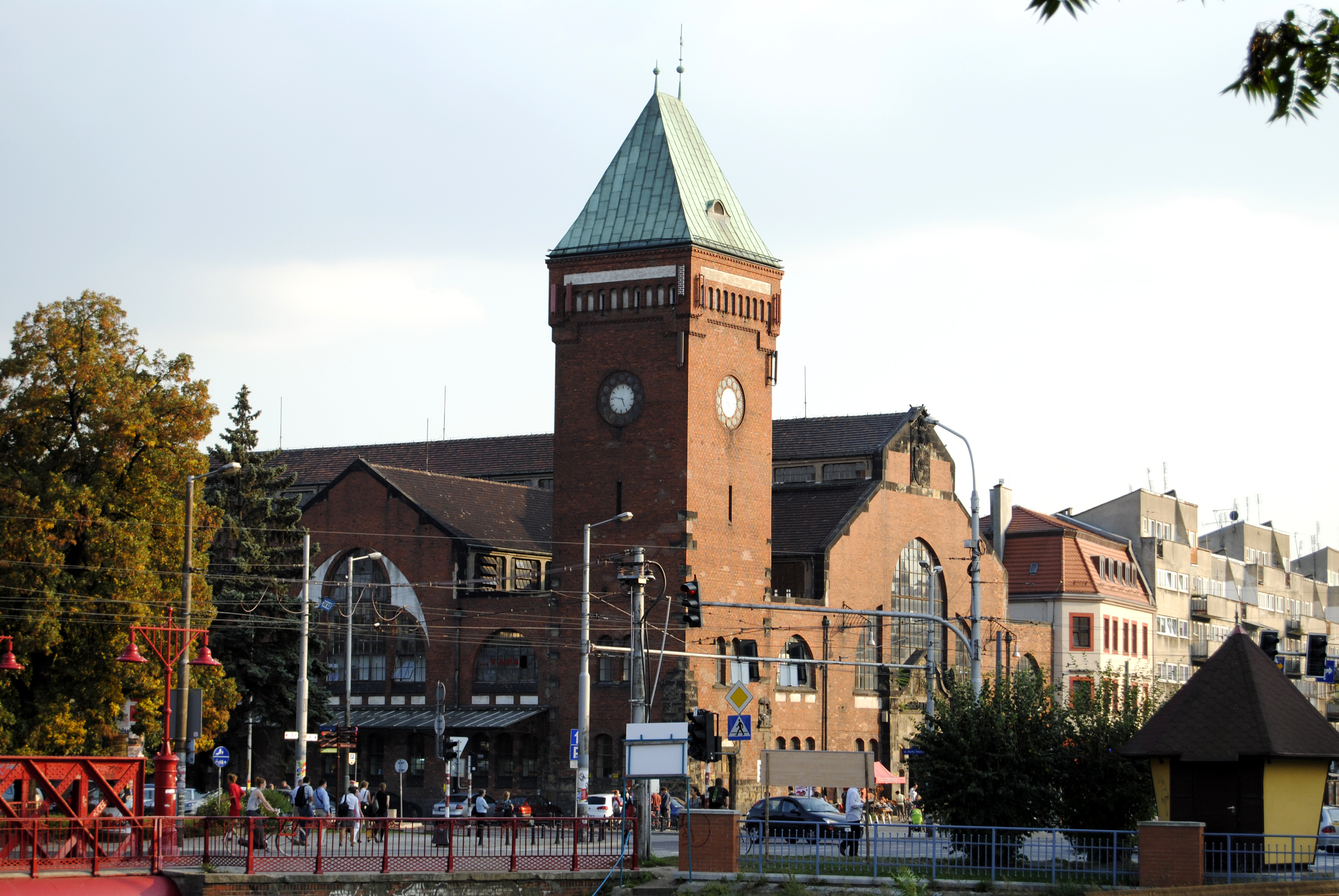 Wrocław - Hala Targowa